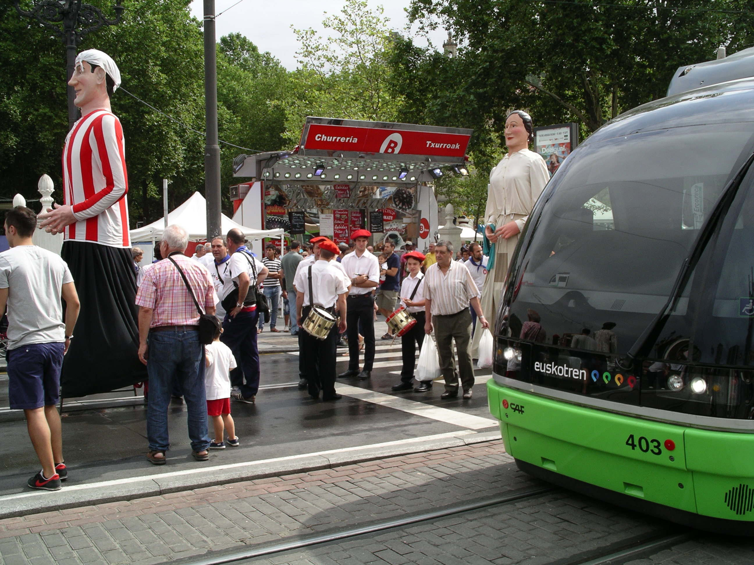 Bilboko tranbia, erraldoiak eta dultzaineroak jaietan. Areatzako zubia, Aste Nagusia, Bilbao (Bizkaia).